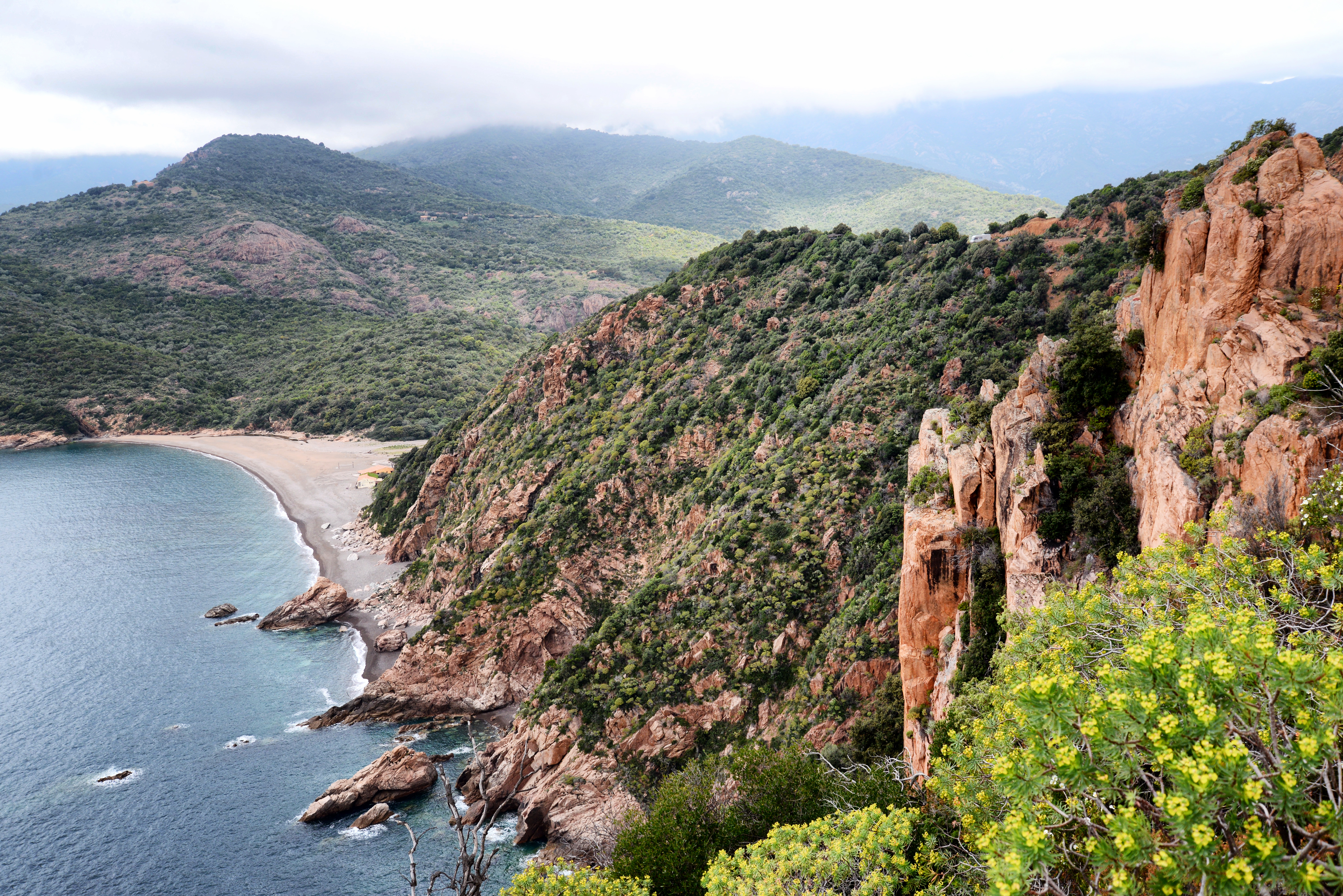 Plage de Bussaghia (à cheval sur Serriera et Partinello) et partie nord du littoral d'Ota-Porto. Au premier plan l'euphorbe arborescente en fleurs.